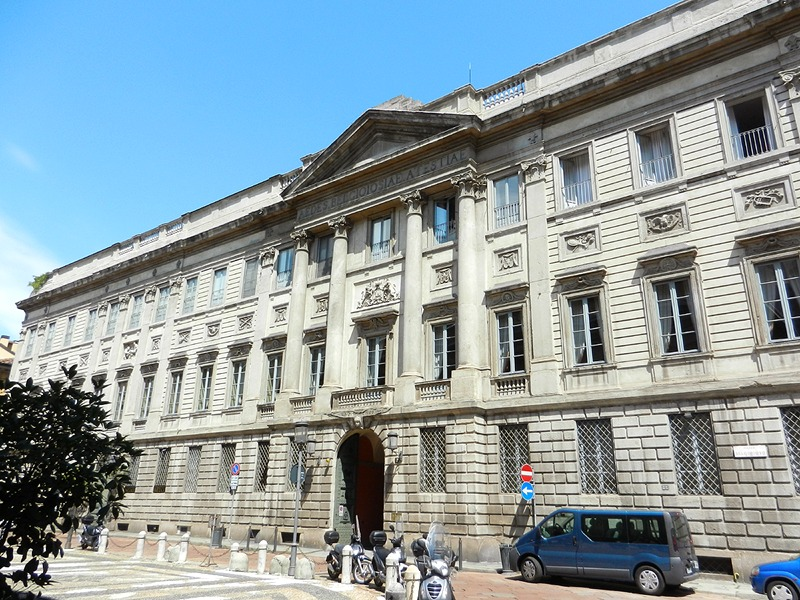 Milano - Palazzo Belgioioso